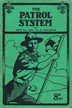 Okładka książki "The Patrol System" Rolanda E. Philippsa [1]